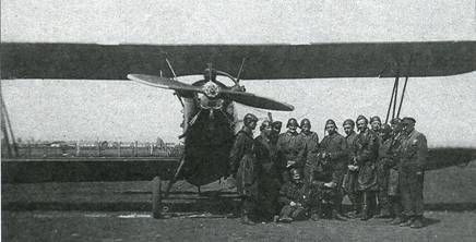 Летная группа инструктора Д.Т.Никишина у самолета У-2 №28